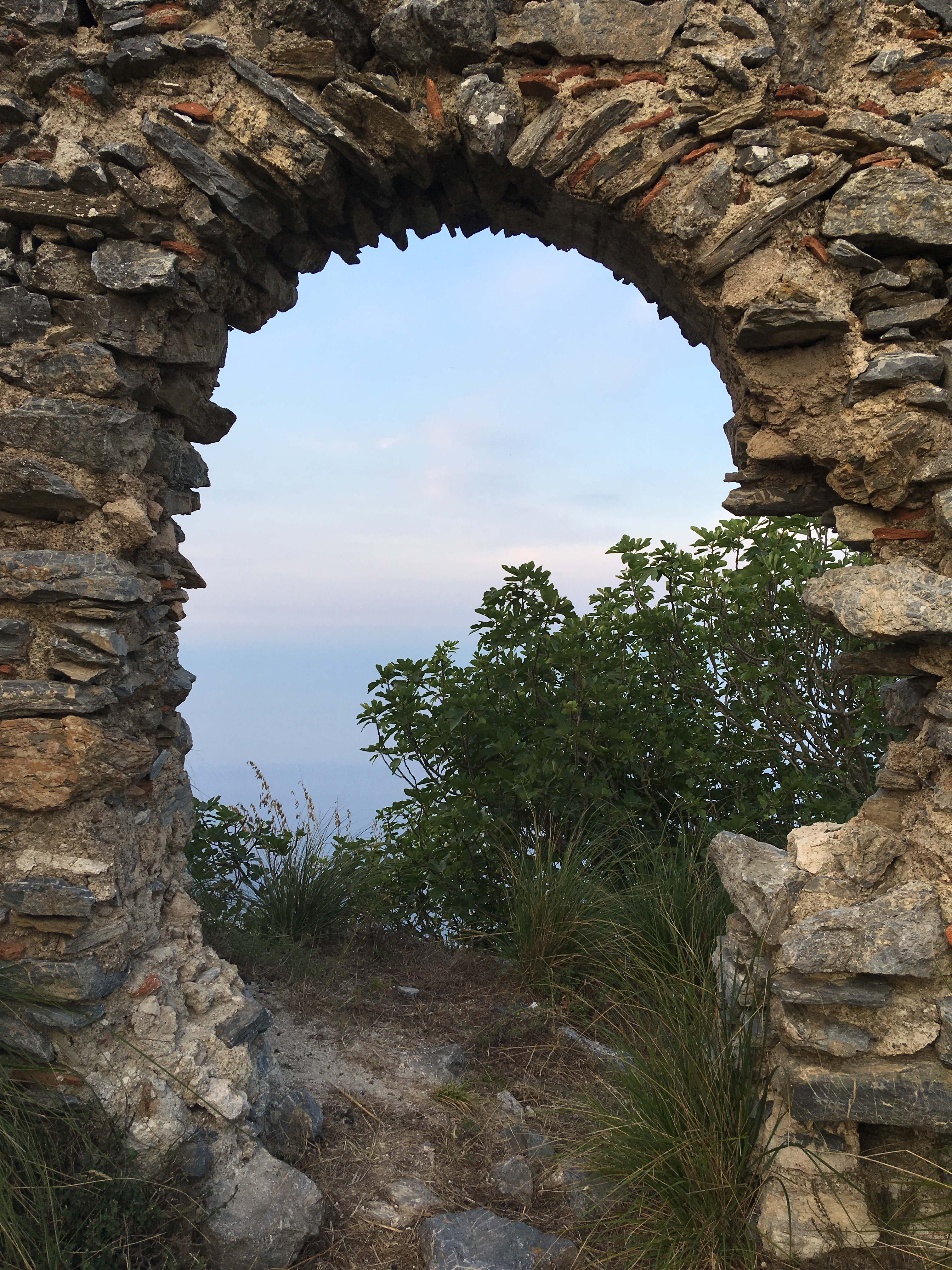 Resti delle antiche costruzioni a Gioiosa Guardia (Sicilia)